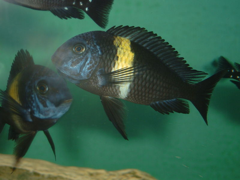 Tropheus duboisi "Maswa"